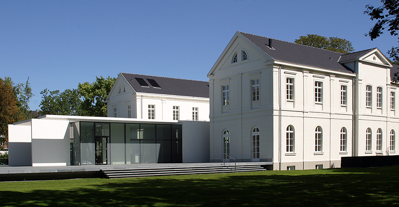 Neu- und Altbau des Max-Ernst-Museums in der Stadt Brühl, Architekt: Thomas van den Valentyn